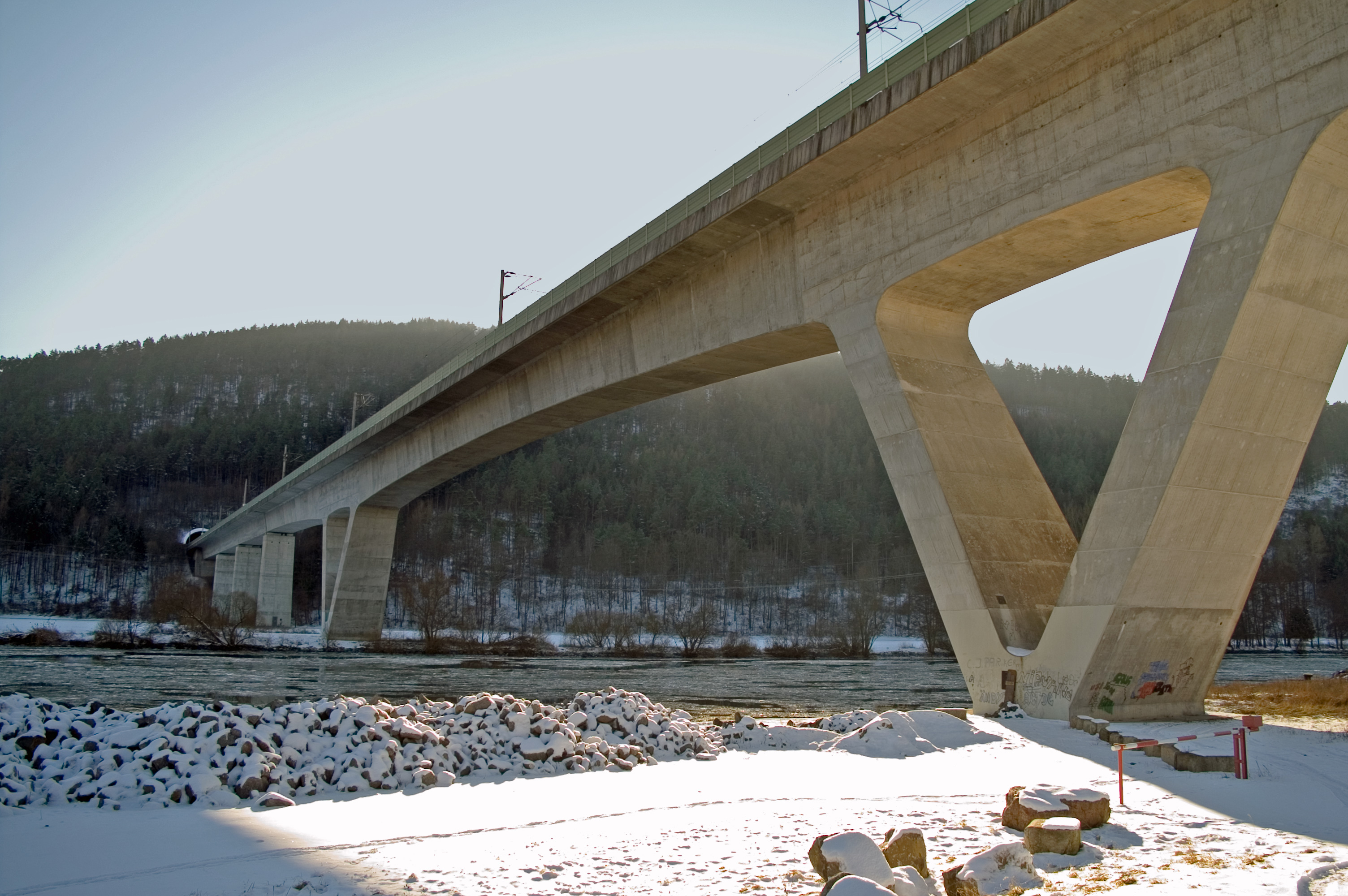 Description: Germany Main Railroad Hannover/Würzburg Gemünden Maintalbrücke